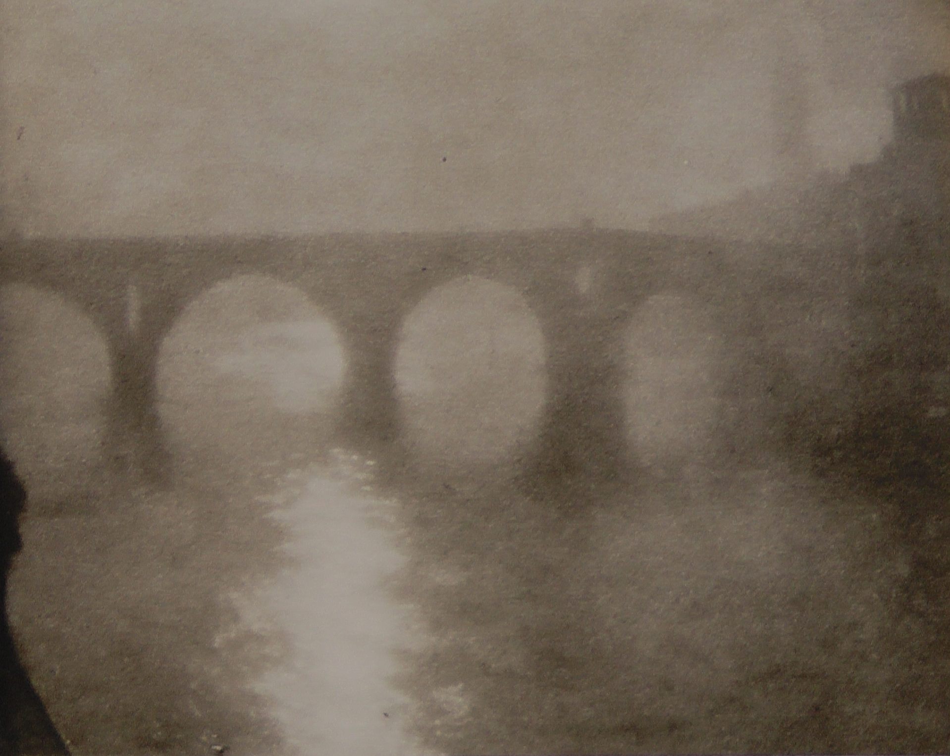 Юрий Ерёмин. Мост в Вероне, 1907